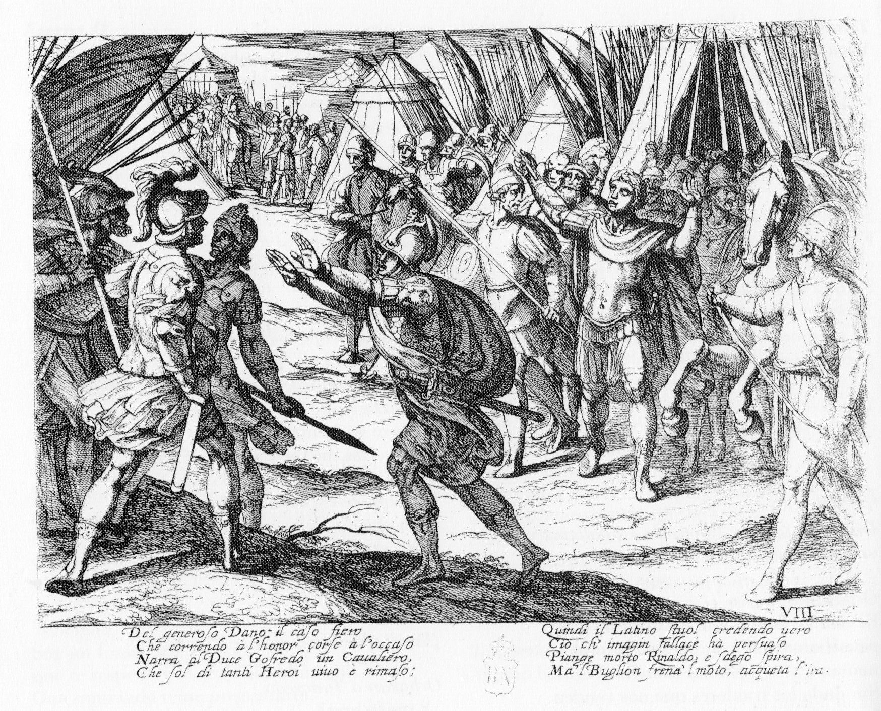 Antonio Tempesta, grabado para la Gerusalemme Liberata (Tasso)